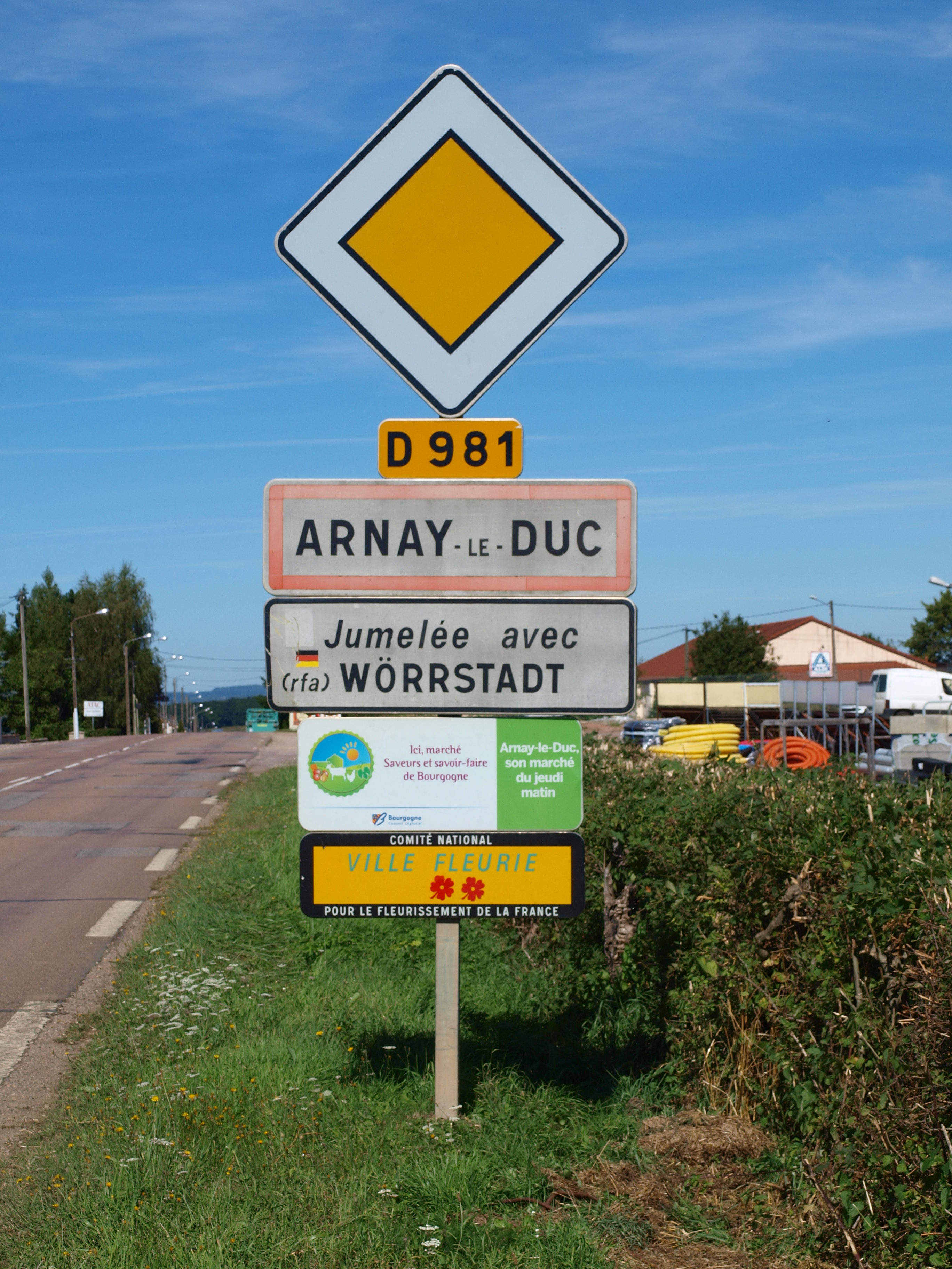 Arnay-le-Duc (Côte d'Or, France) ; panneau d'agglomération.